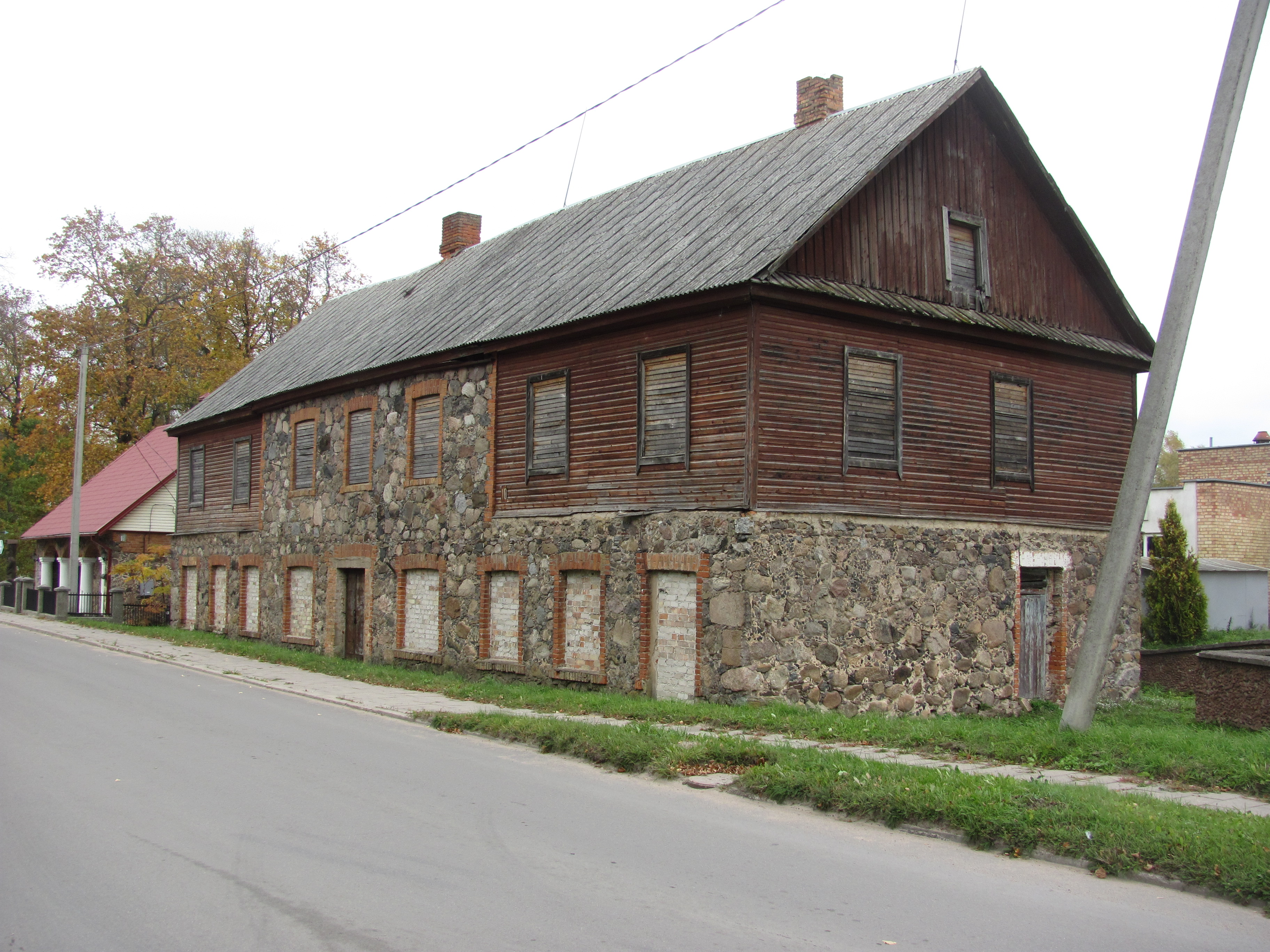 Kavoliškis, Lithuania